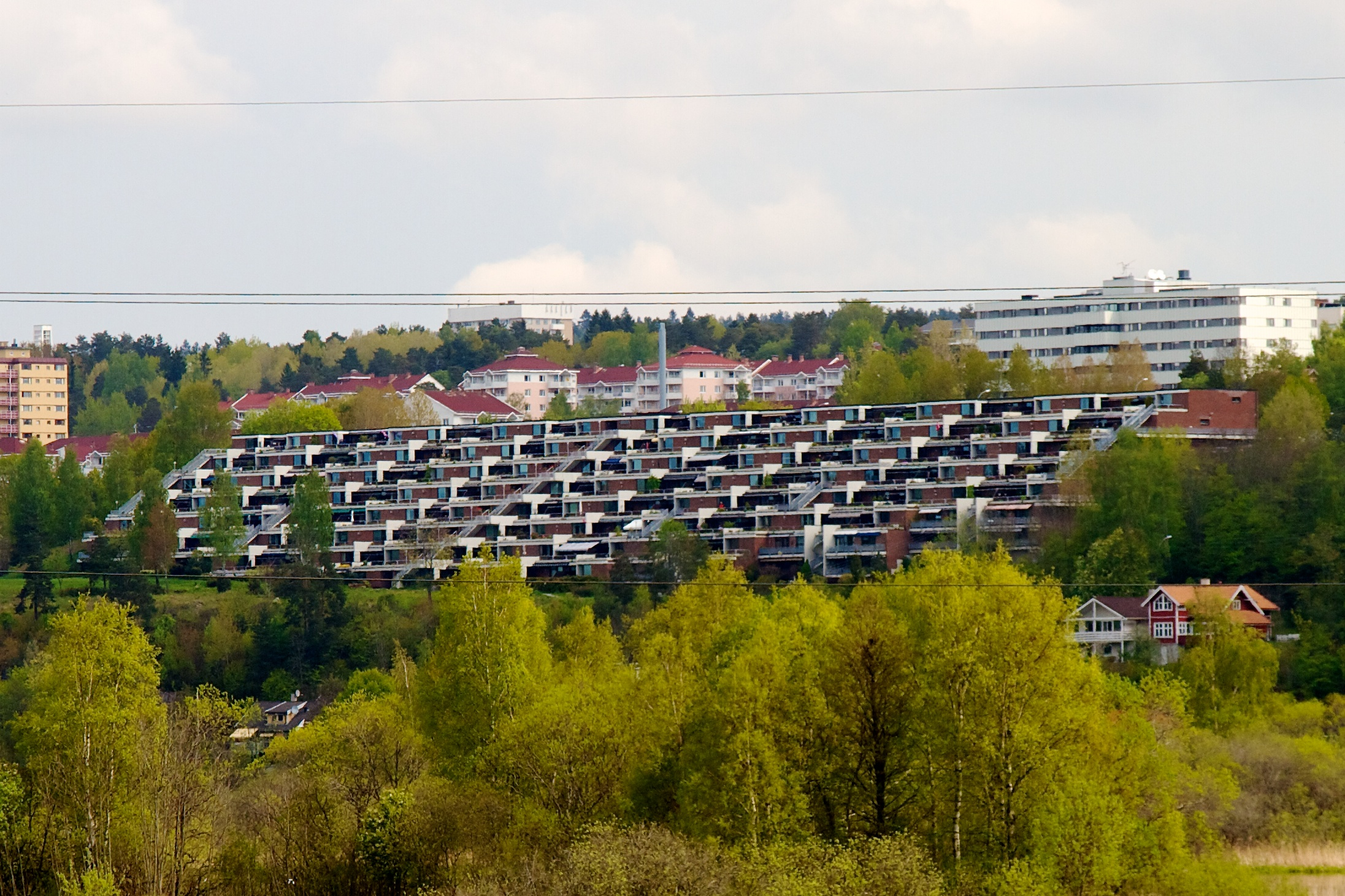 Oppsal terrasse sett fra Abildsø